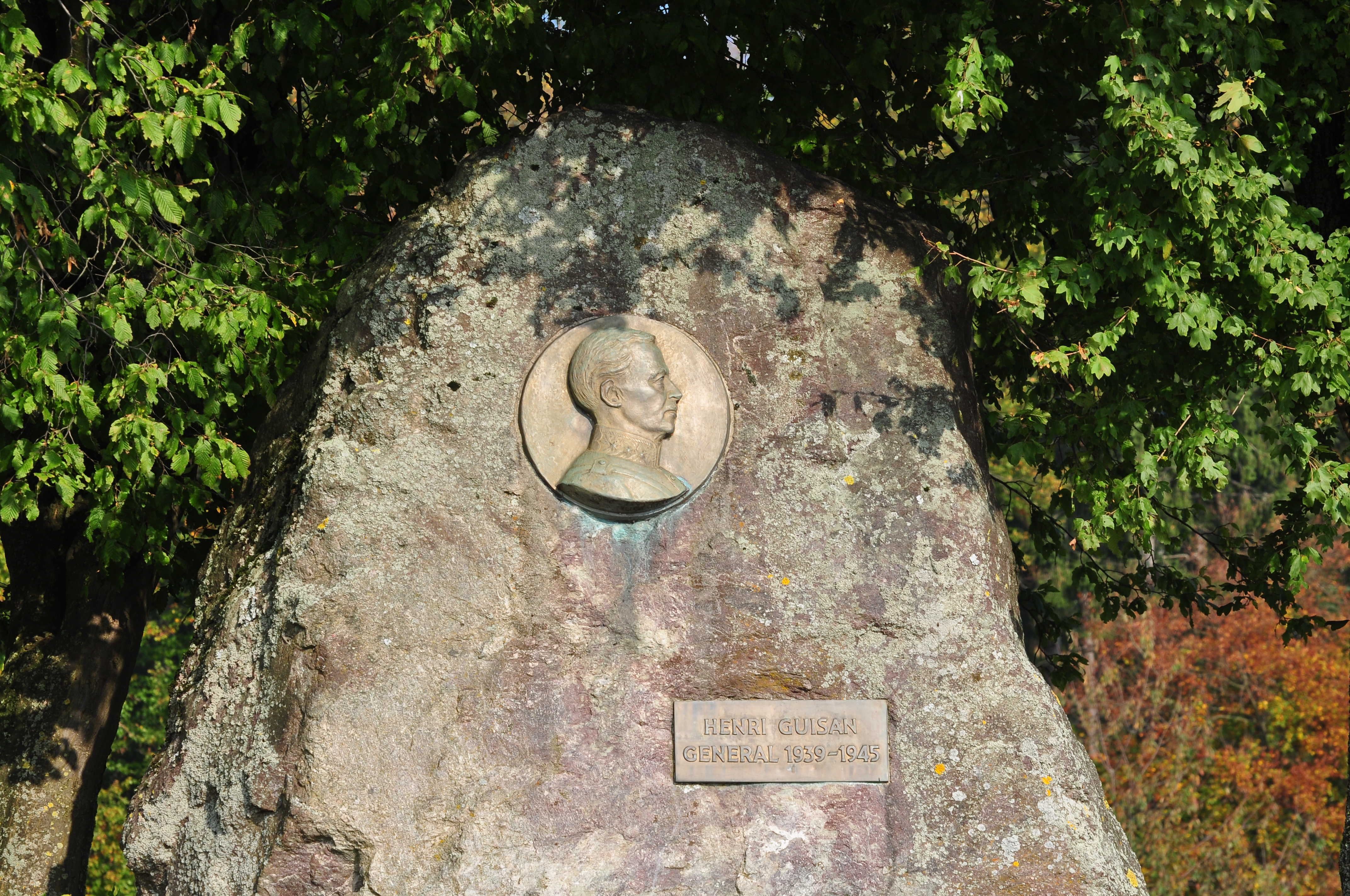 Henri Guisan Denkmal (memorial), Allmend in Zollikon (Switzerland)